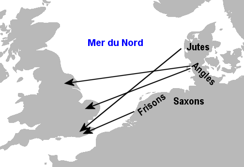 Carte des invasions germaniques de l'Angleterre à partir du 5e siècle (d'après The Cambridge encyclopedia of the English language, CUP 1995)